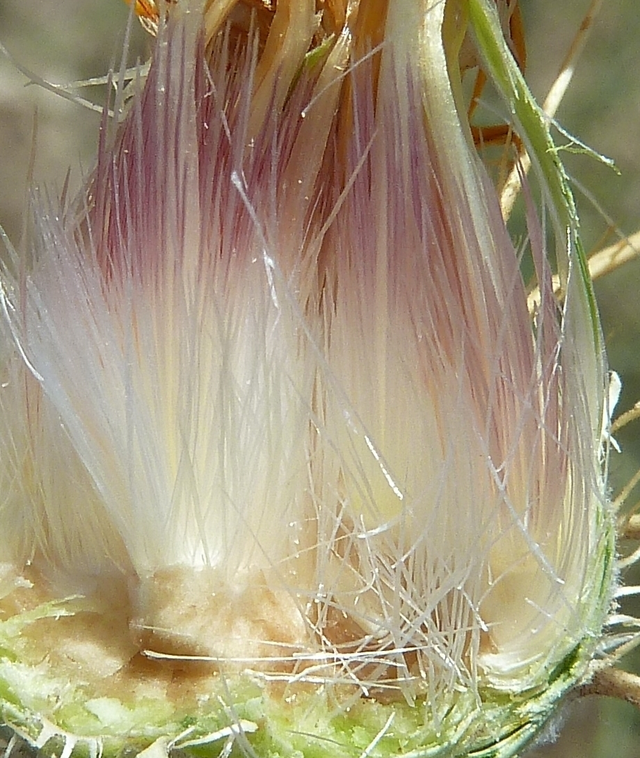 Centaurea ornata - Involucro abierto dejando visibles las finas páleas de cerdas sedosas del receptáculo. - circa Estación FFCC RENFE/ADIF de contenedores de Abroñigal/Embajadores (Madrid, España).